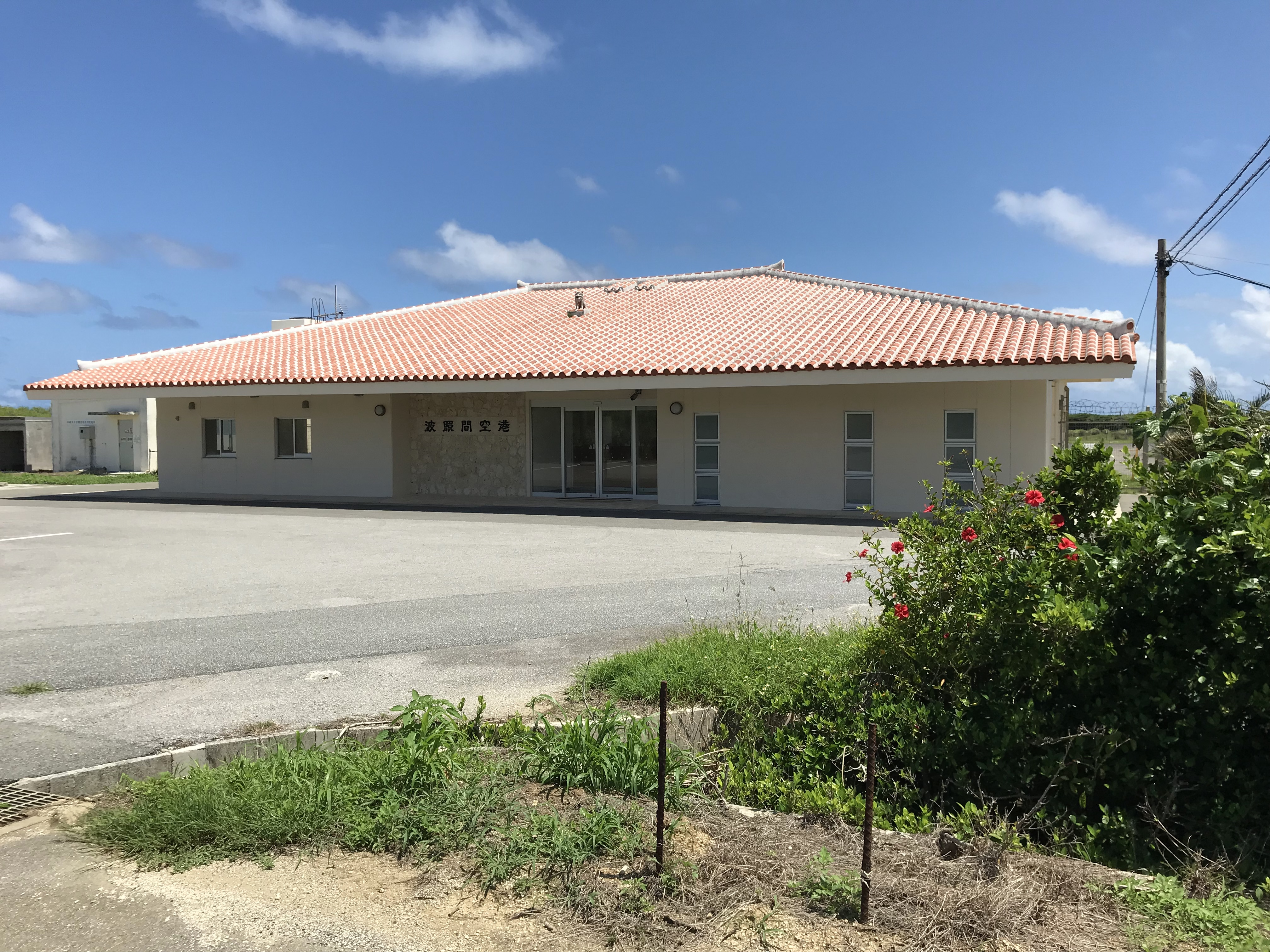 沖縄県竹富町波照間島波照間空港